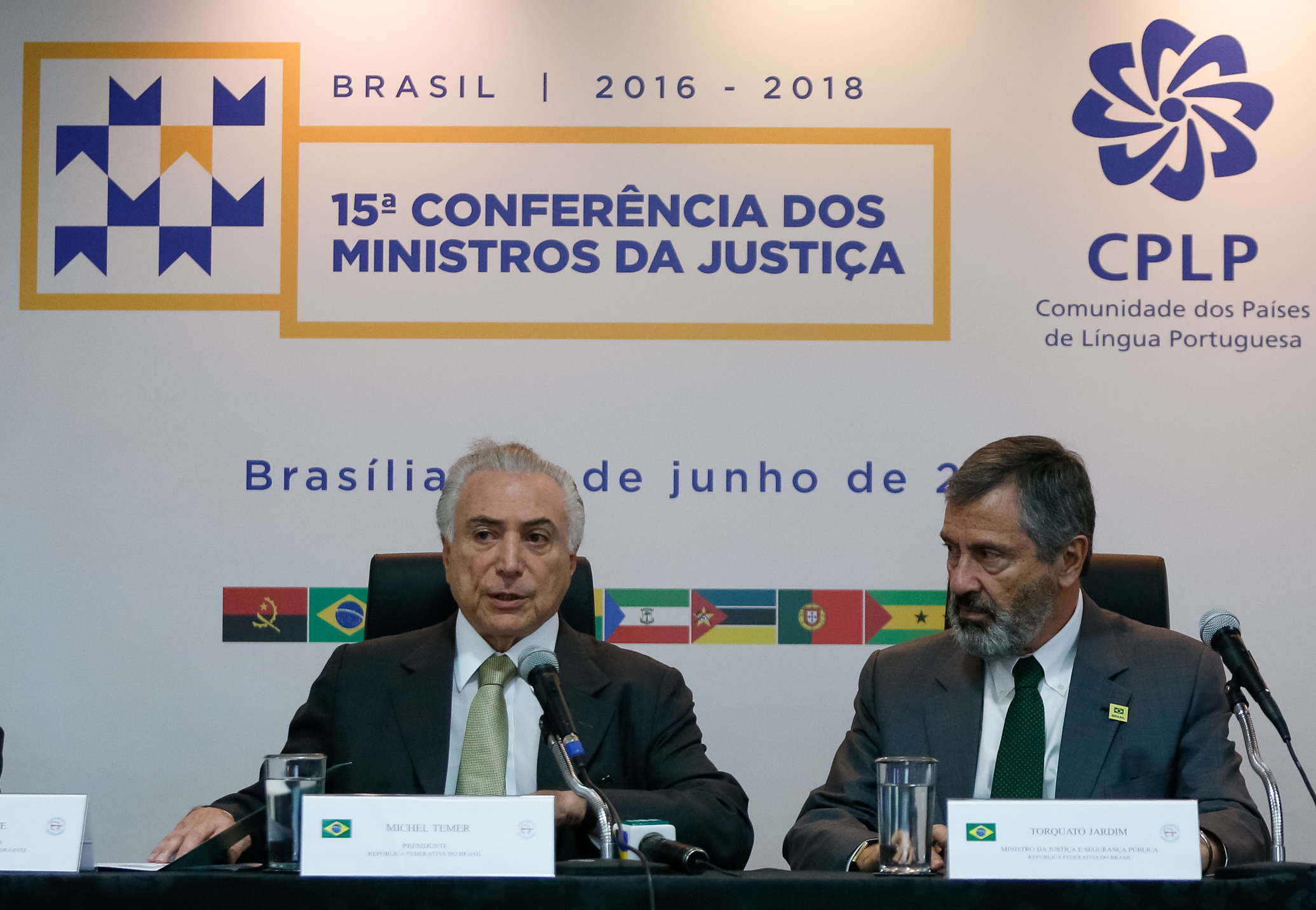 29/06/2017 - Abertura da 15ª Conferência dos Ministros da Justiça da Comunidade dos Países de Língua Portuguesa - CPLP